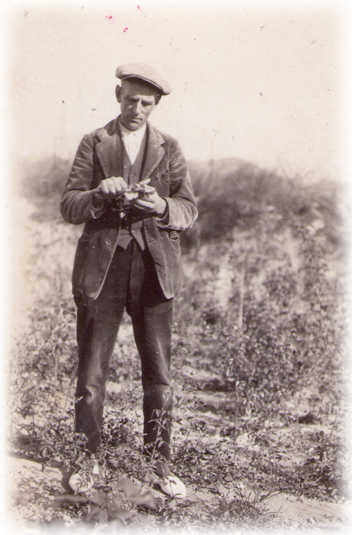 Imagen de Pere Dot